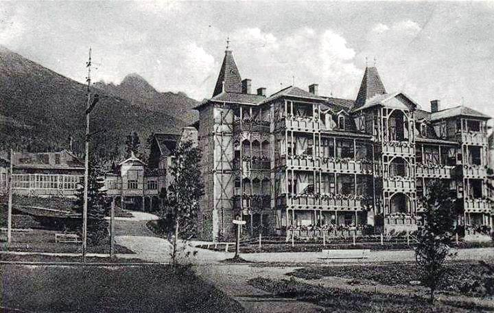 Sanatórium Európa - kúpele Nový Smokovec